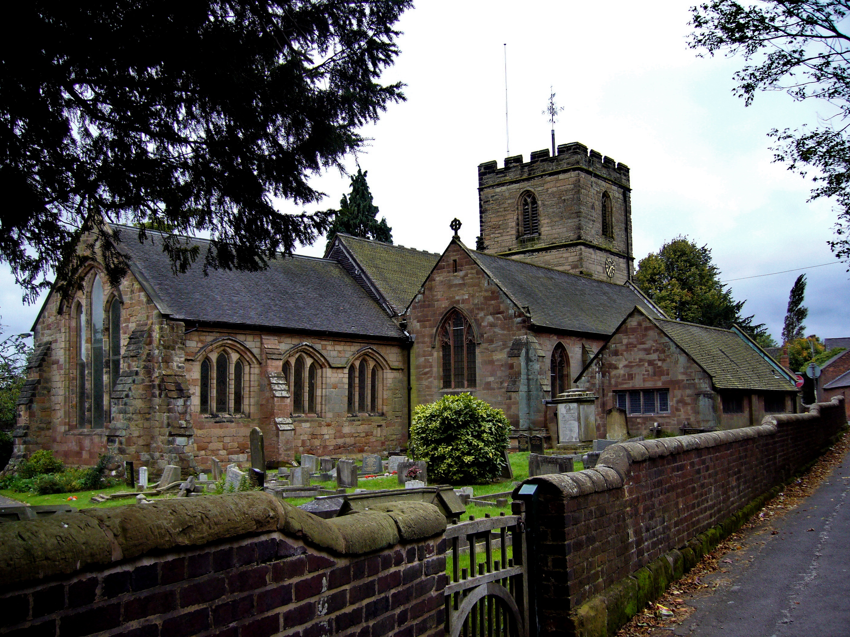 St.Laurence Church